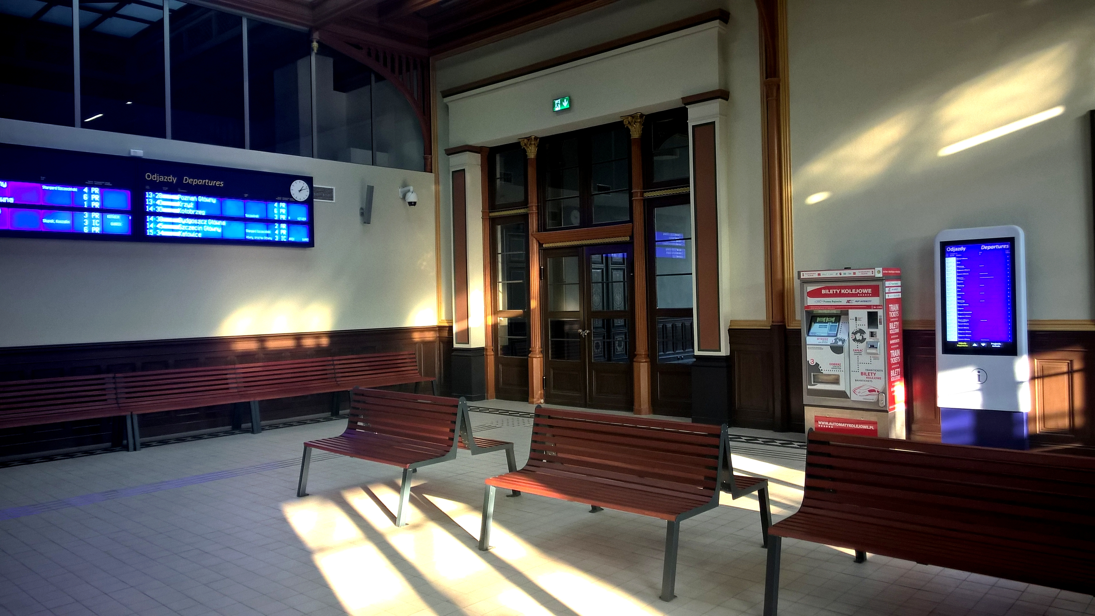 Hol kasowy.